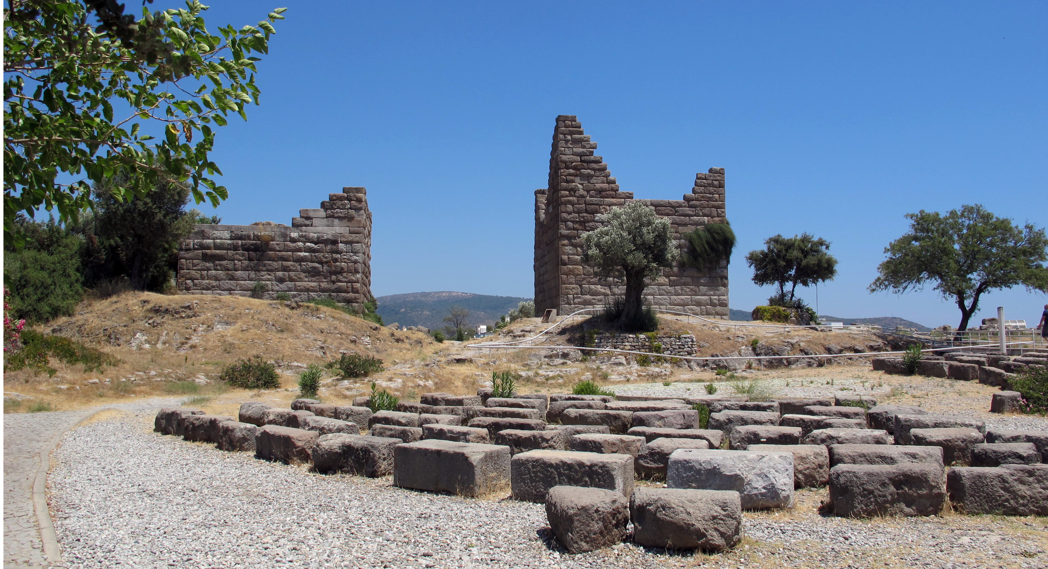 Bodrum, porta di myndos